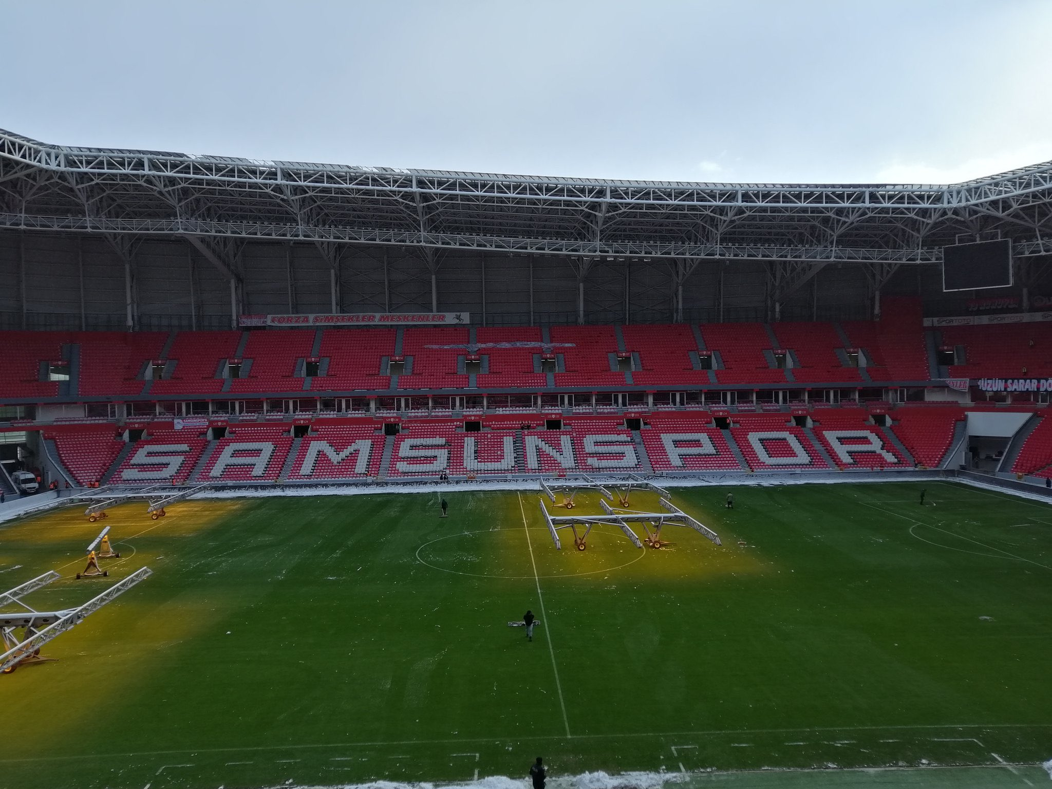 9 Şubat 2020 tarihindeki Samsunspor-Afjet Afyonspor karşılaşmasının öncesinde karlı zemini maça uygun hâle getirmek için çalışan ısıtma panelleri.